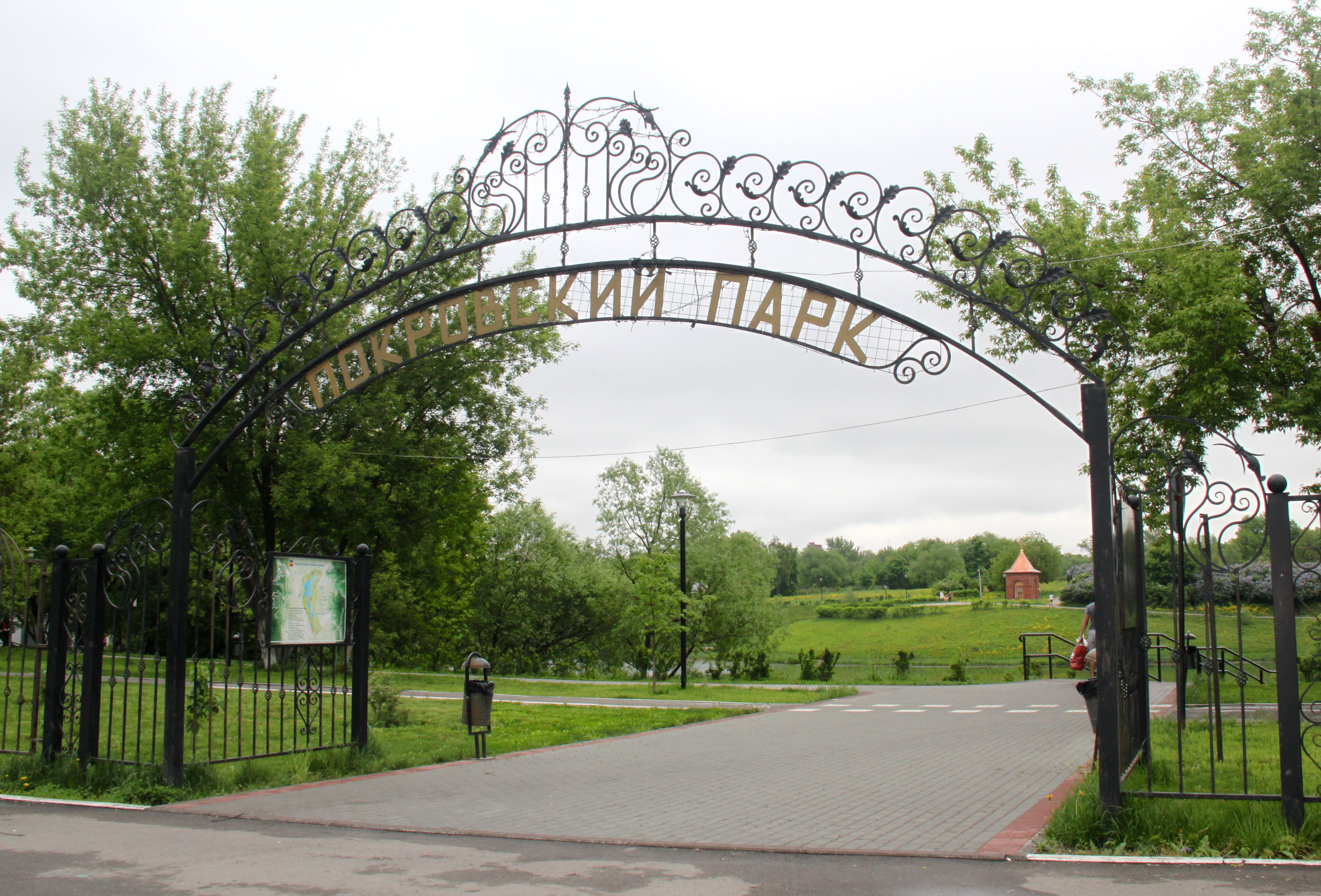 Покровский парк